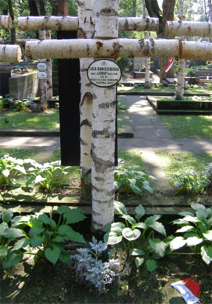 Krzyż nad grobem Lidii Daniszewskiej, Powązki wojskowe w Warszawie (fot Zu)